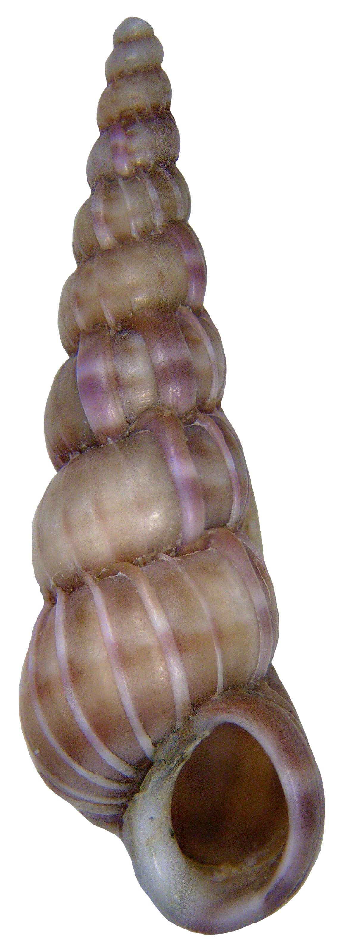 Familie: Volutidae Groesse: 45 mm Verbreitung: Mittelmeer, Atlantik, Nordsee, westliche Ostsee Fundort: Italien, Adria, Milano Marittima leg.det. U.Schmidt, 1984 Photo: U.Schmidt, 2009